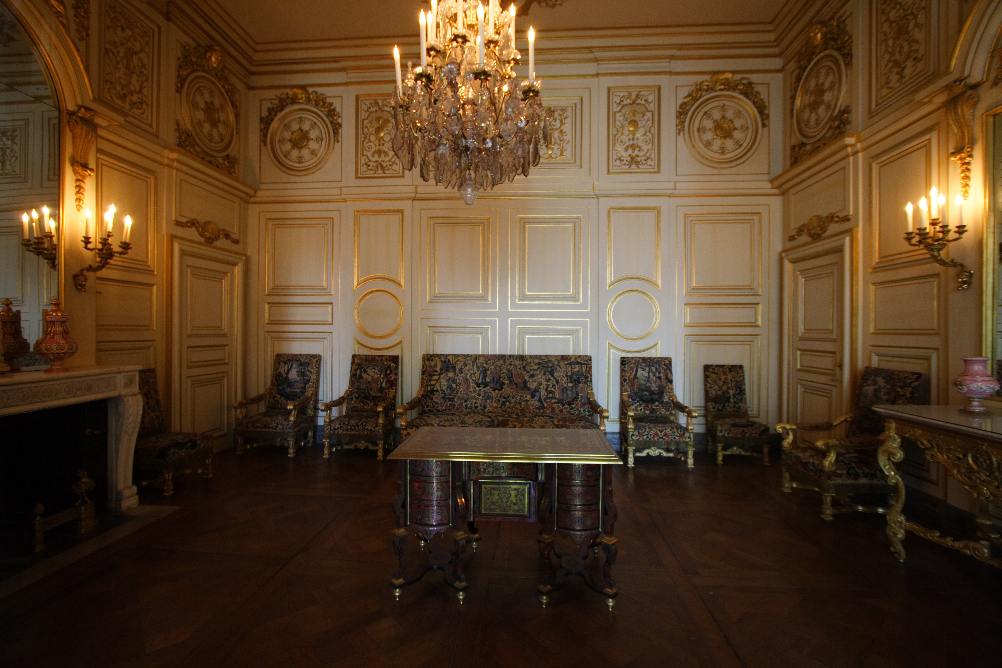 Der Große Salon der Appartements Madame de Maintenons im Schloss Fontainebleau